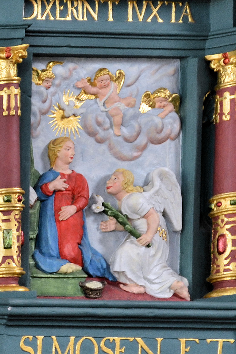 Kościół Narodzenia Najświętszej Maryi Panny w Gryfinie